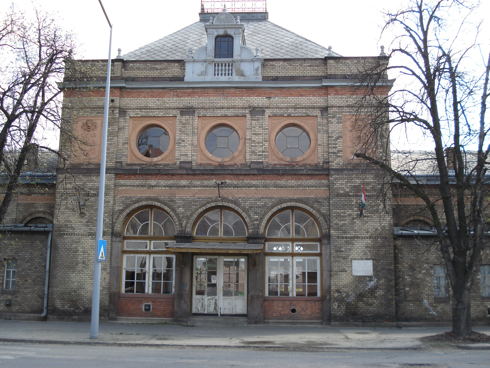 Gömöri Pályaudvar (Miskolc, -) This is a photo of a monument in Hungary, Identifier: 2929